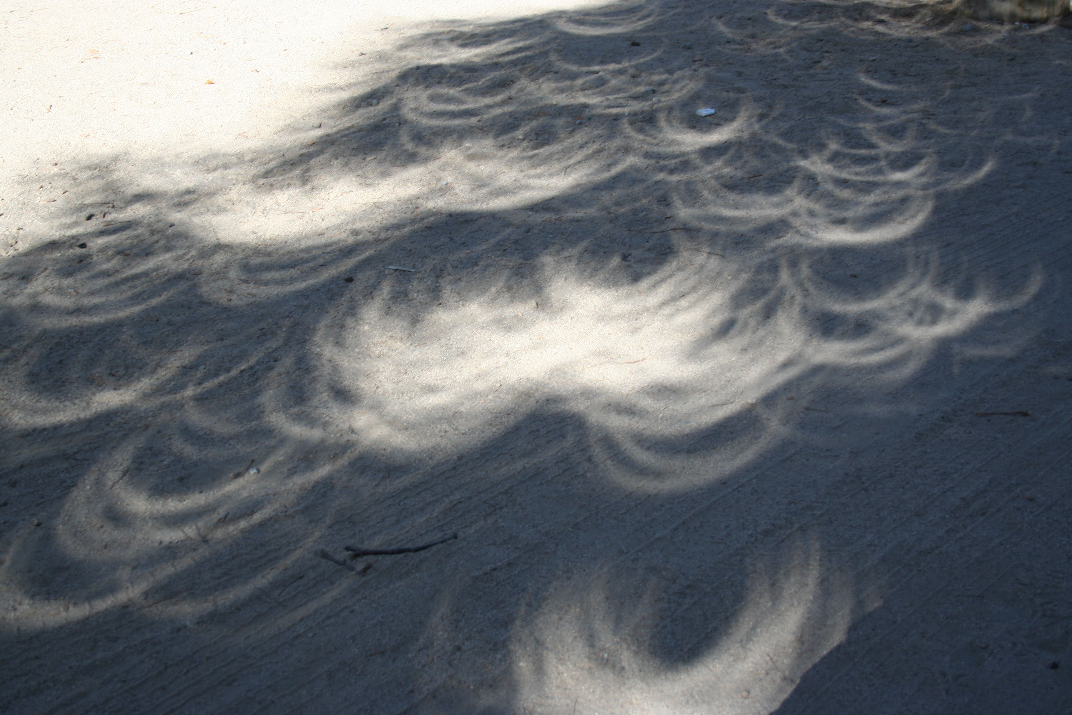 Lichtkringel im Schatten eines Baumes während der ringförmigen Sonnenfinsternis am 3. Oktober 2005 in Madrid. Publiziert in der Fachzeitschrift ORION der Schweizerischen Astronomischen Gesellschaft SAG